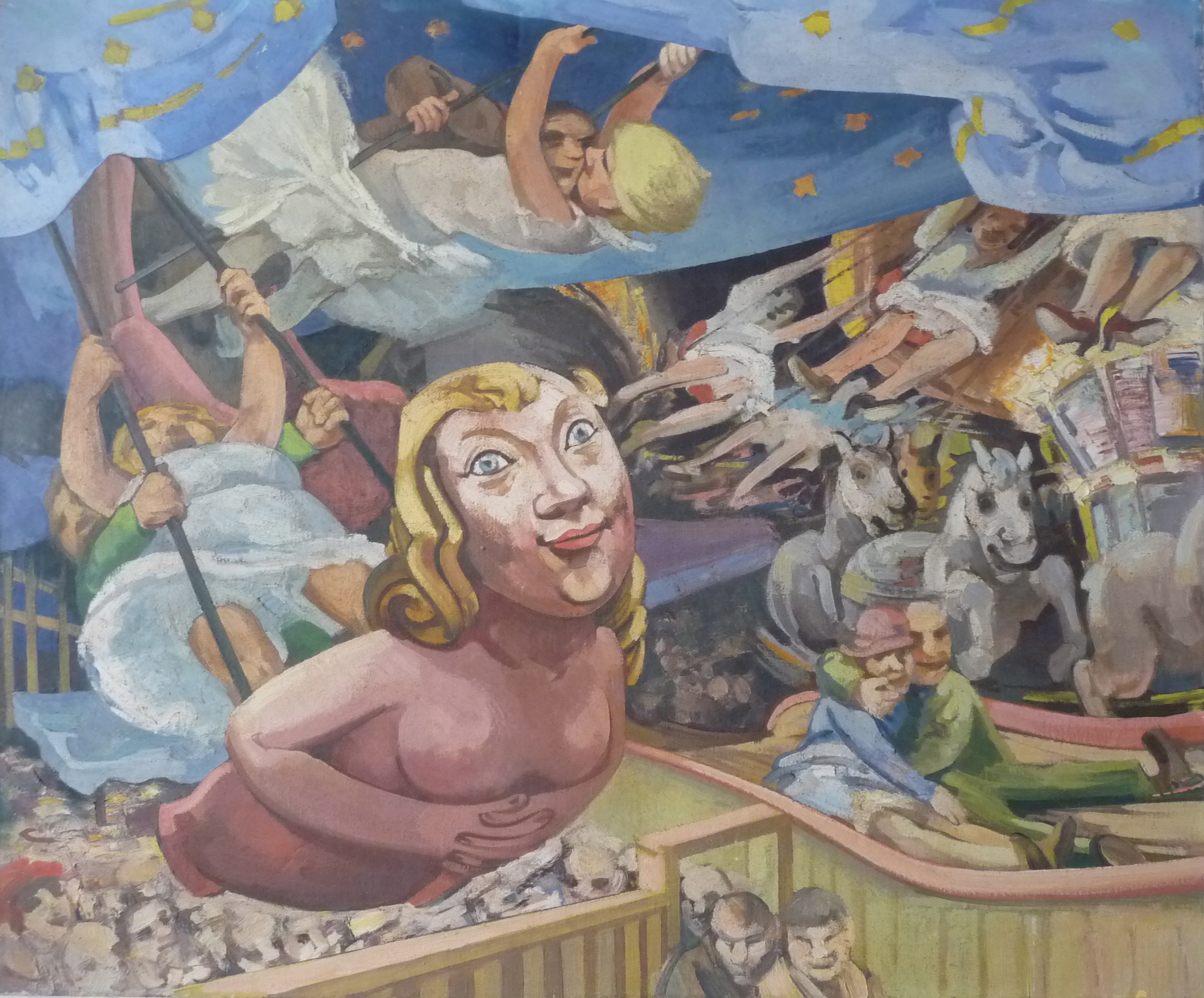 Rudolf Wilhelm Heinisch, Juxplatz, 1931, Oil on Canvas, 88,5 x 118 cm